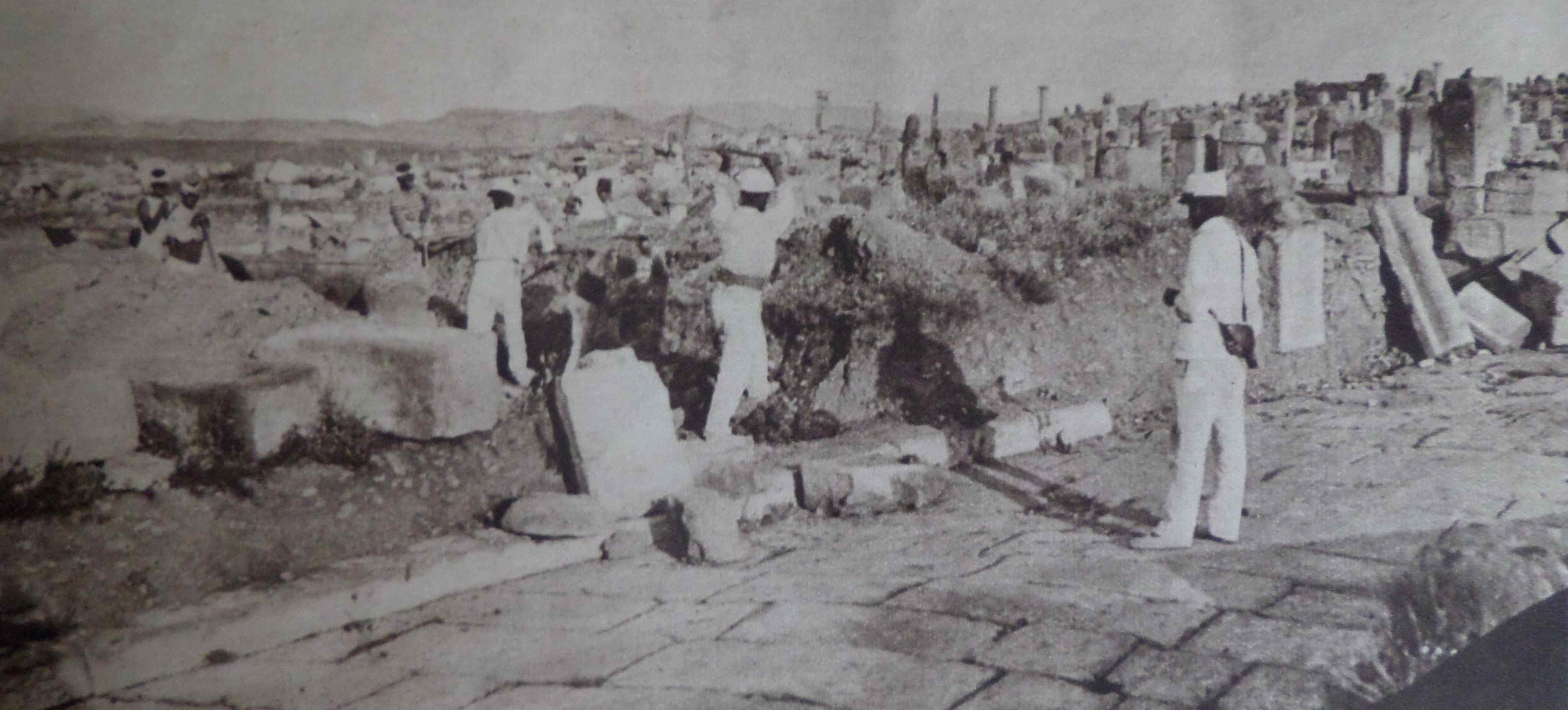 « Les Disciplinaires aux fouilles de Timgad » : in dossier sur « Les bagnes militaires ».